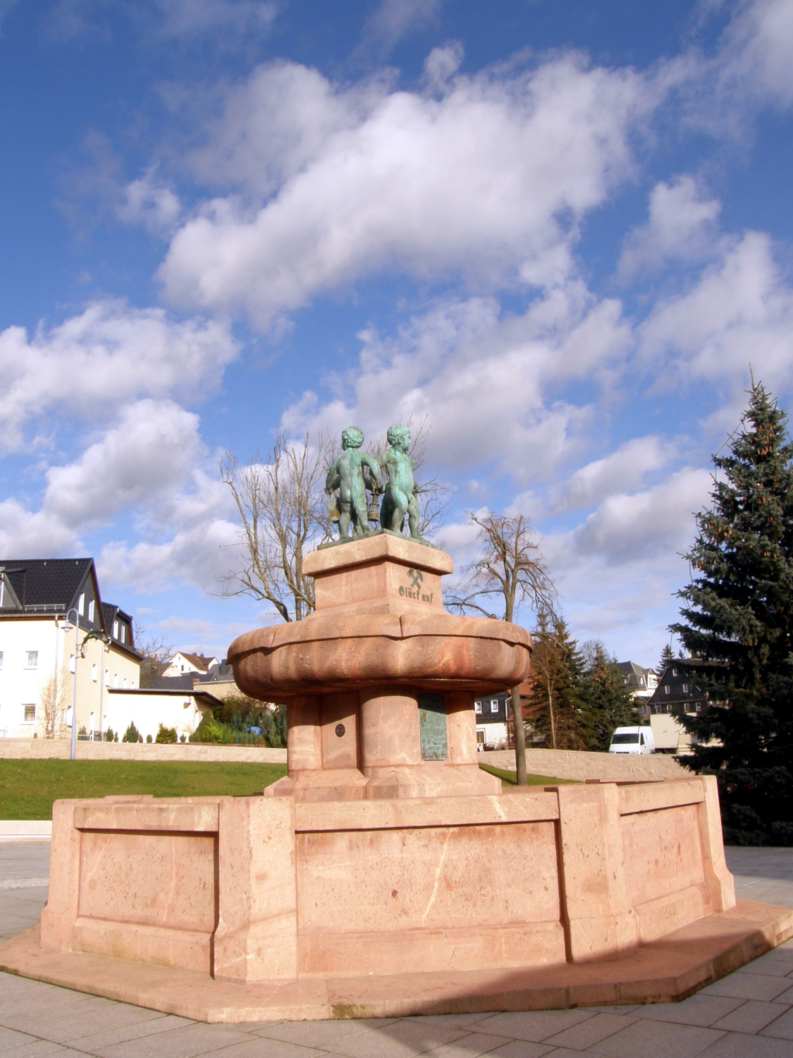 Rudolph-Brunnen auf dem Marktplatz in Oelsnitz, Erzgebirge; Er wurde durch den in Oelsnitz geborenen, seit 1874 in Teplitz-Schönau tätigen Architekten Hermann Rudolph gestiftet und zum Heimatfest im Juli 1914 eingeweiht.